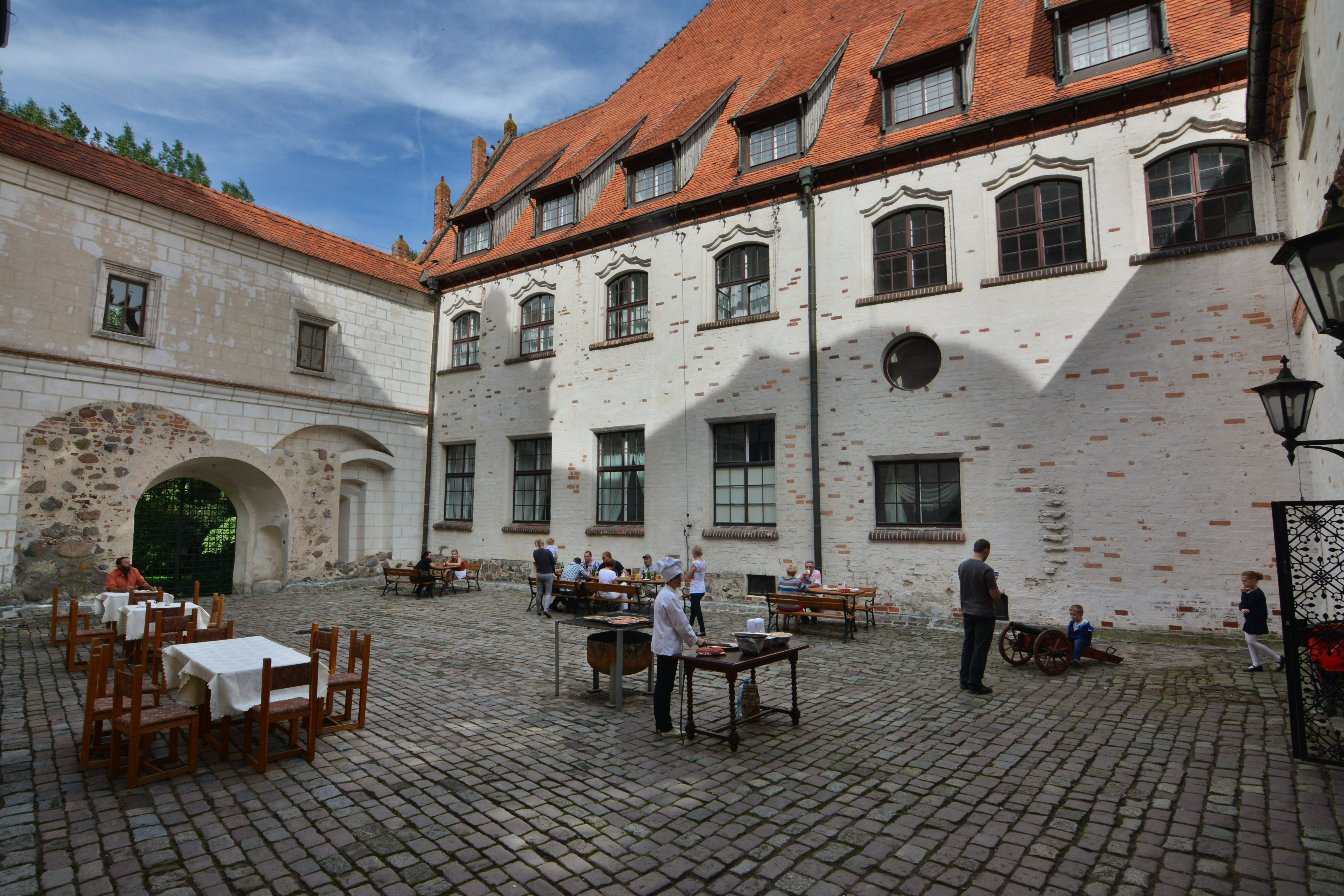 Pęzino - zamek, XIV, 1 poł. XVI, 1600, XIX